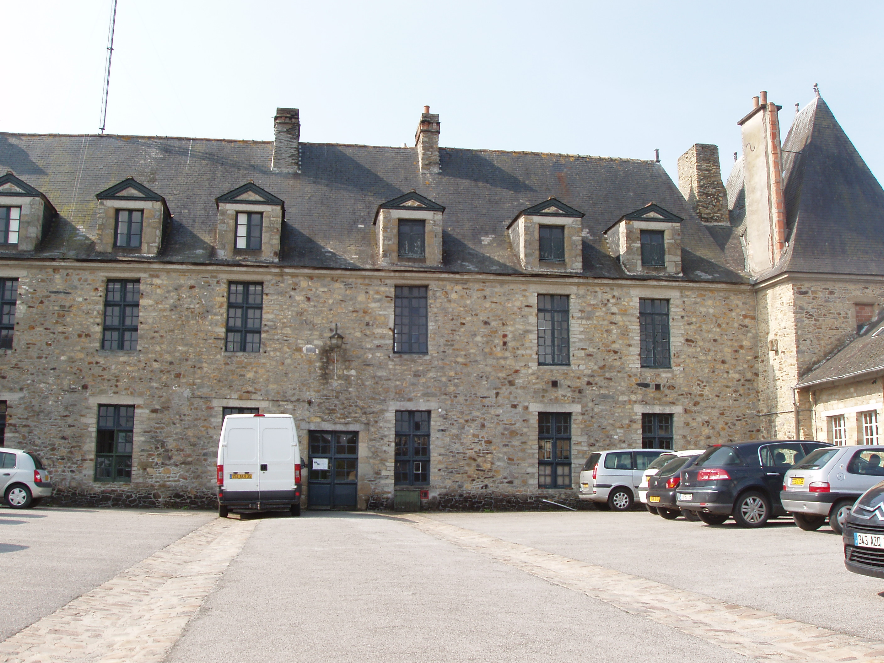 Château Marie, monument historique de Vitré